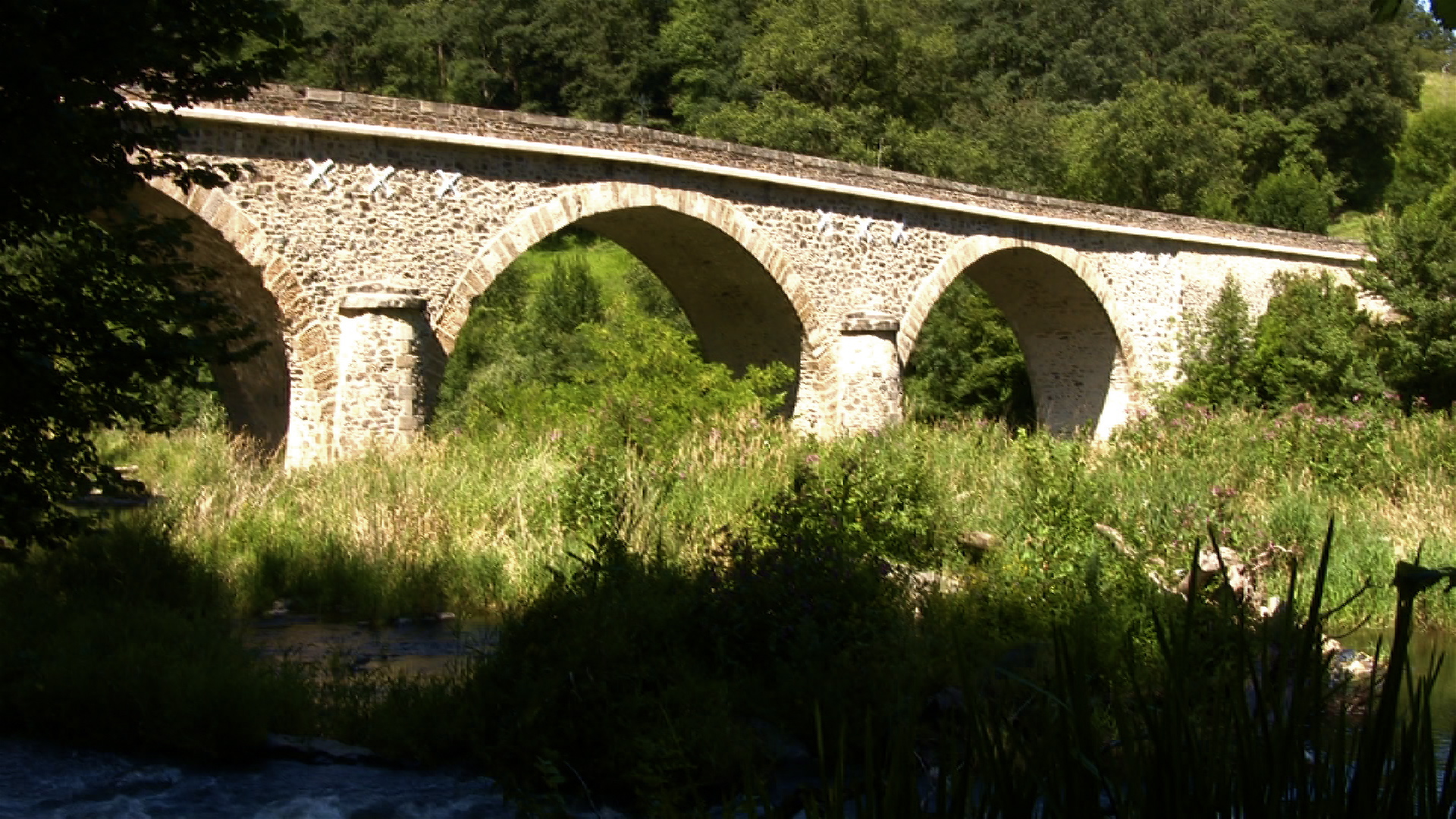 Pont de Chipole, vallée du Lot (Pomayrols-Aveyron-France). C'est le troisième pont construit sur le Lot à cet endroit de la vallée; En 1329, le seigneur de Pomayrols de l'époque fit construire le premier, il se situait au hameau de Chipole, il fut détruit par une des violentes crues que subit la vallée durant l'hiver 1705. En 1859 un second et éphémère pont fut à nouveau construit. Bâtit dans la précipitation, inauguré le 16 octobre 1859, il ne supporta pas la première crue venue et s'écroula le 5 janvier 1860. Le pont actuel date de 1871, sa construction a été financée par l'Etat. En l'an 2000, il a été consolidé et entièrement rénové[1].